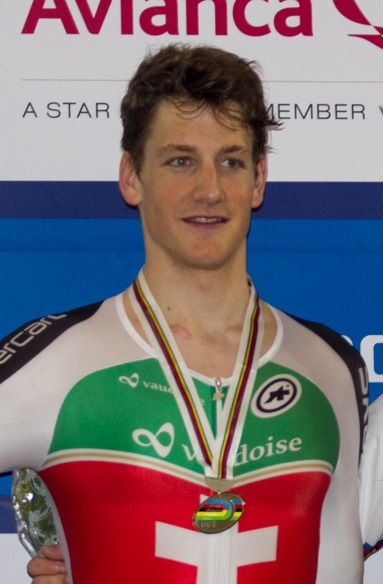 Stefan Kung en el podio de Persecución Individual del Campeonato Mundial de Ciclismo en Pista 2014.